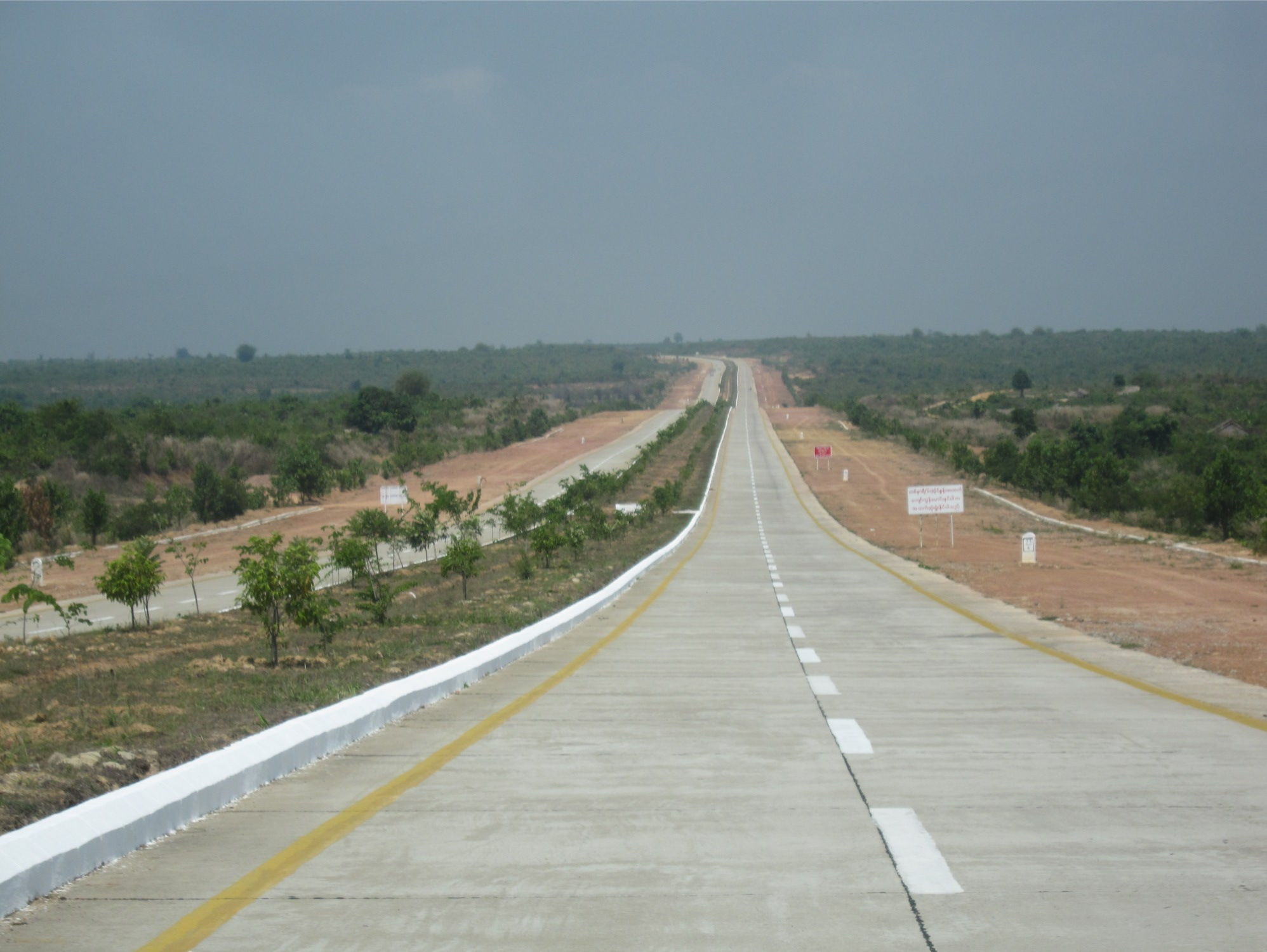 23miles / Yangon-Mandalay Expressway